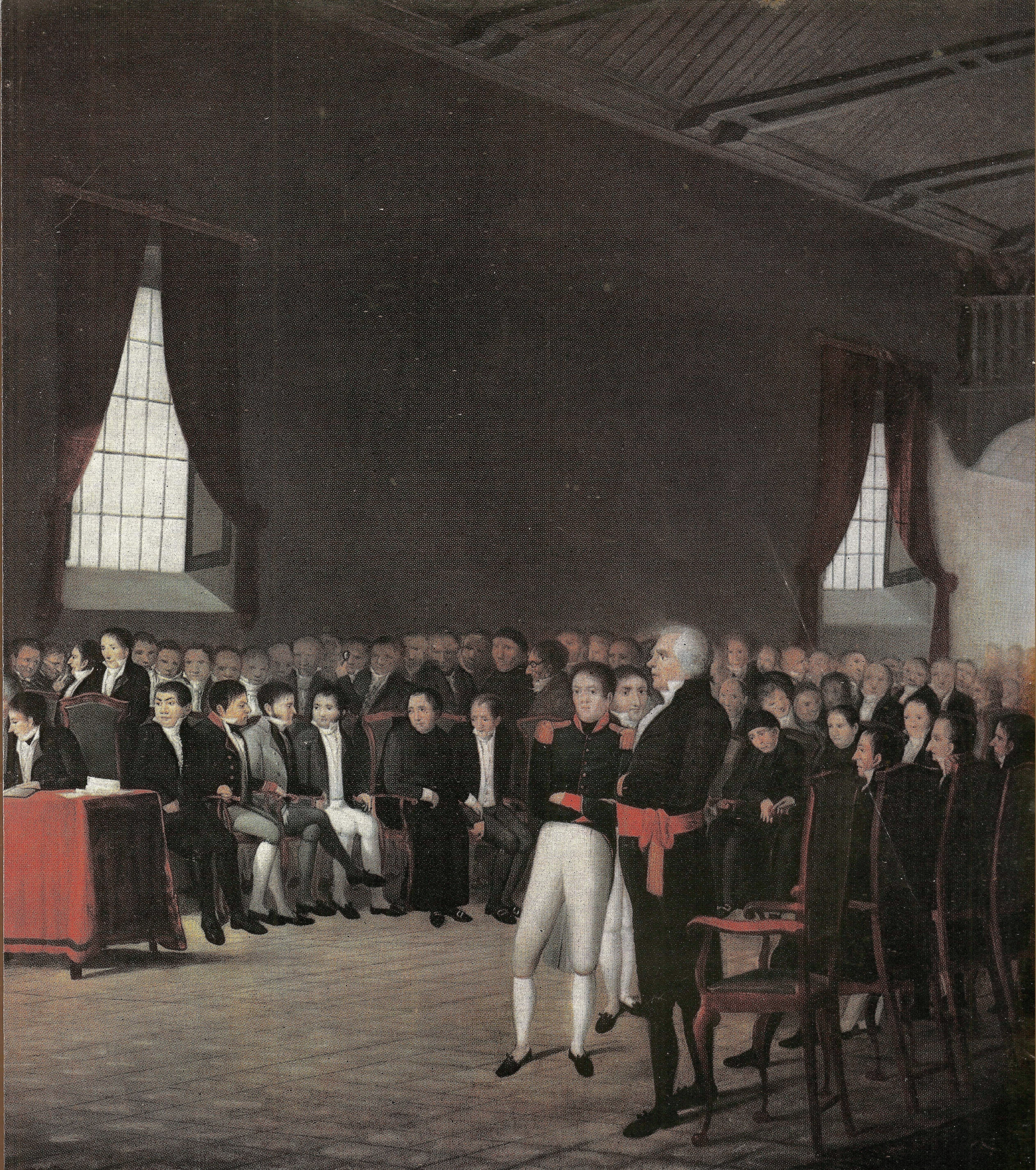 Juan Lovera: Fragmernto derecho del cuadro Firma del Acta de Independencia.